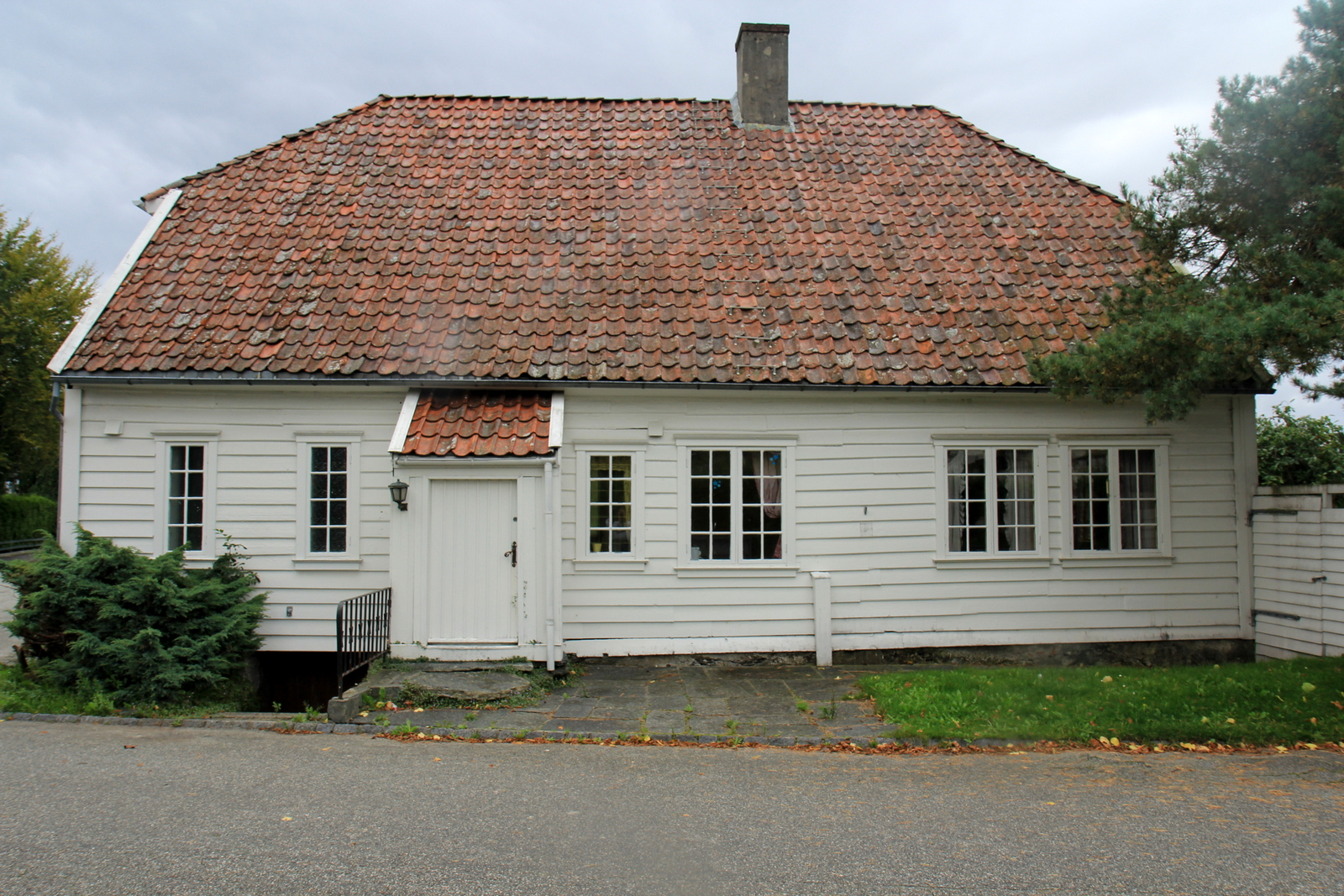 Haugvaldstadminnegt. 8